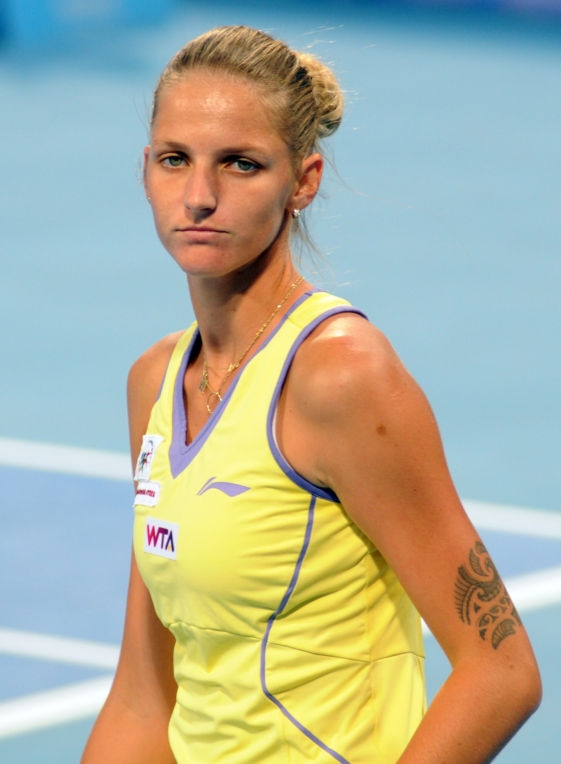 Karolína Plíšková at the 2014 China Open